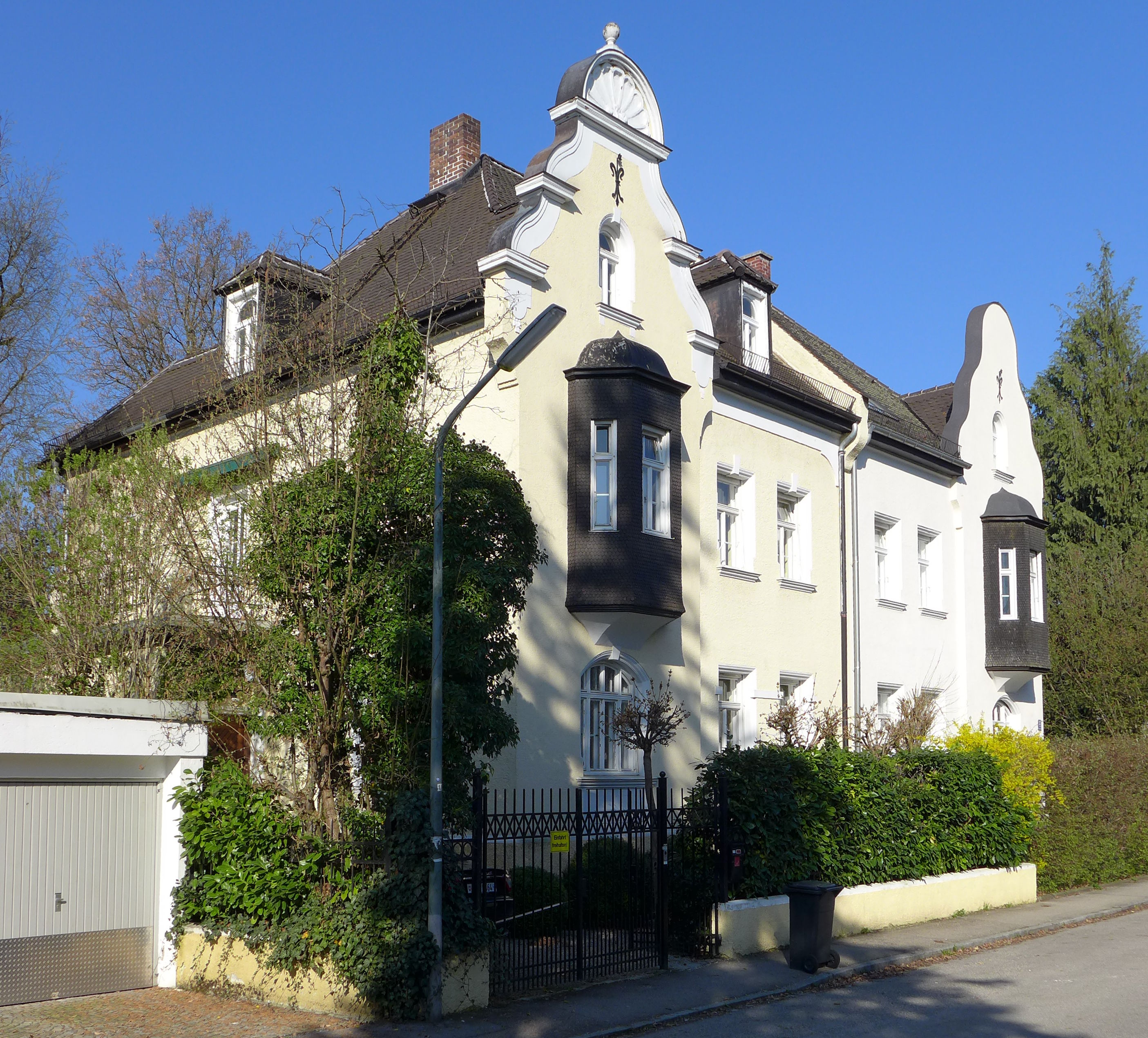 Dachstr. 33-35, München